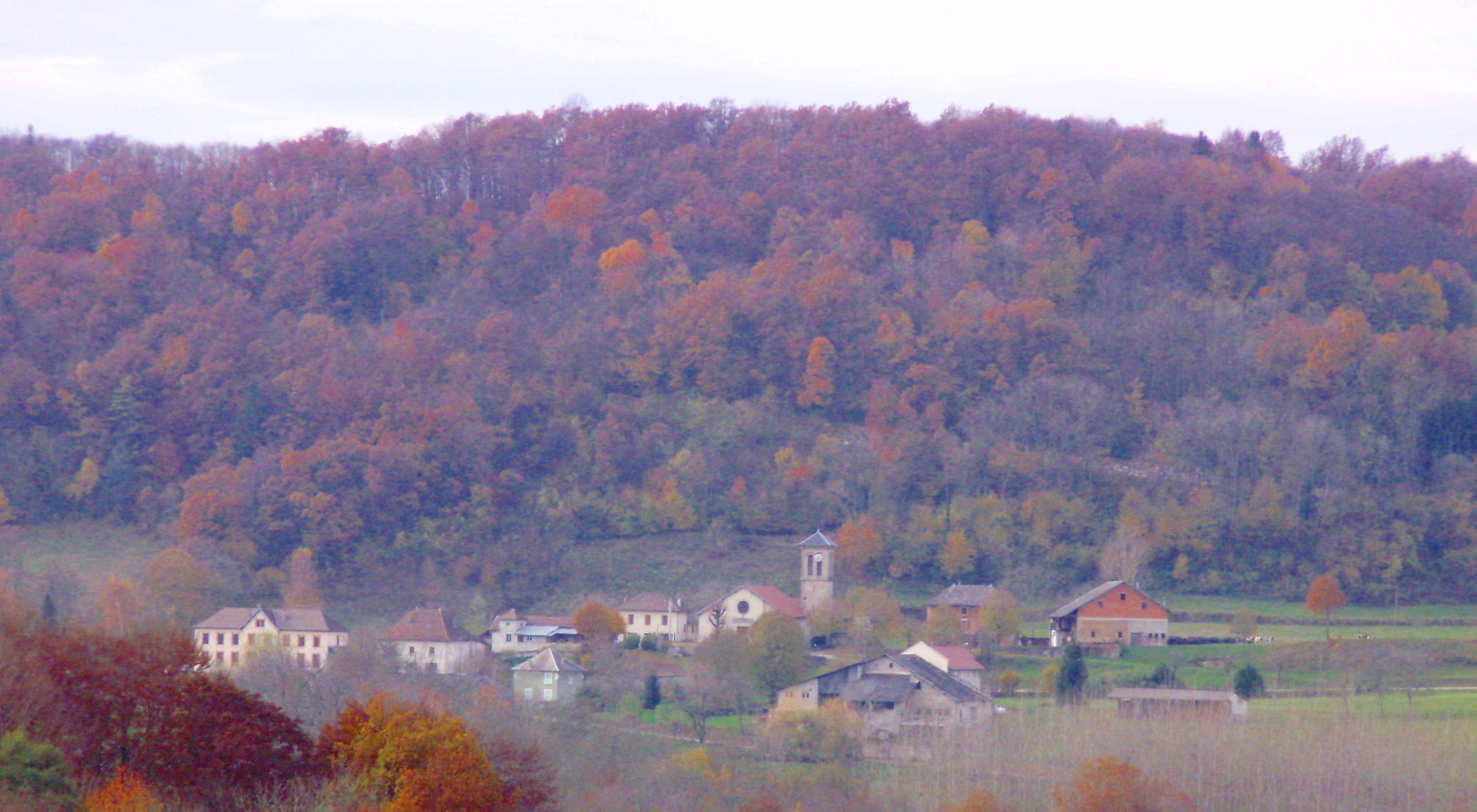 Vue d'une partie du Bourg de Velanne (Isère) avec en arrière plan le Mont Velanne.